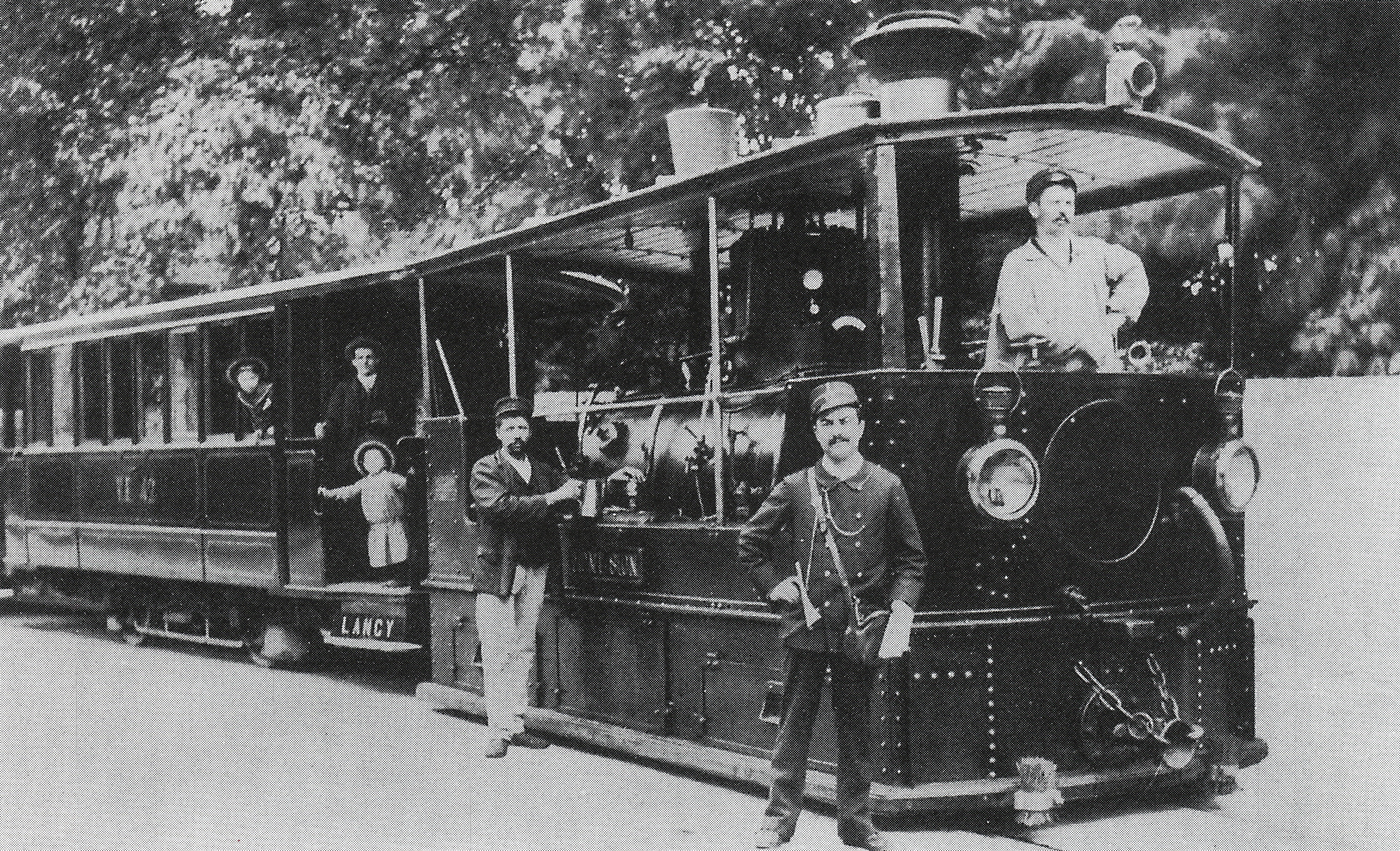 Straßenbahnlocomotive G 3/3 Nr. 6 Mont-Sion der Genfer Schmalſpurbahnen, gebaut 1889 inn der Schweizeriſchen Locomotiv- und Machines-Fabrique zů Winterthur (Fabr.-Nr. 569), 1916 an die k. u. k. Heeresverwaltung Innsbruck, 1918 an die Nonsthalbahn, Abbruchjahr unbekannt.